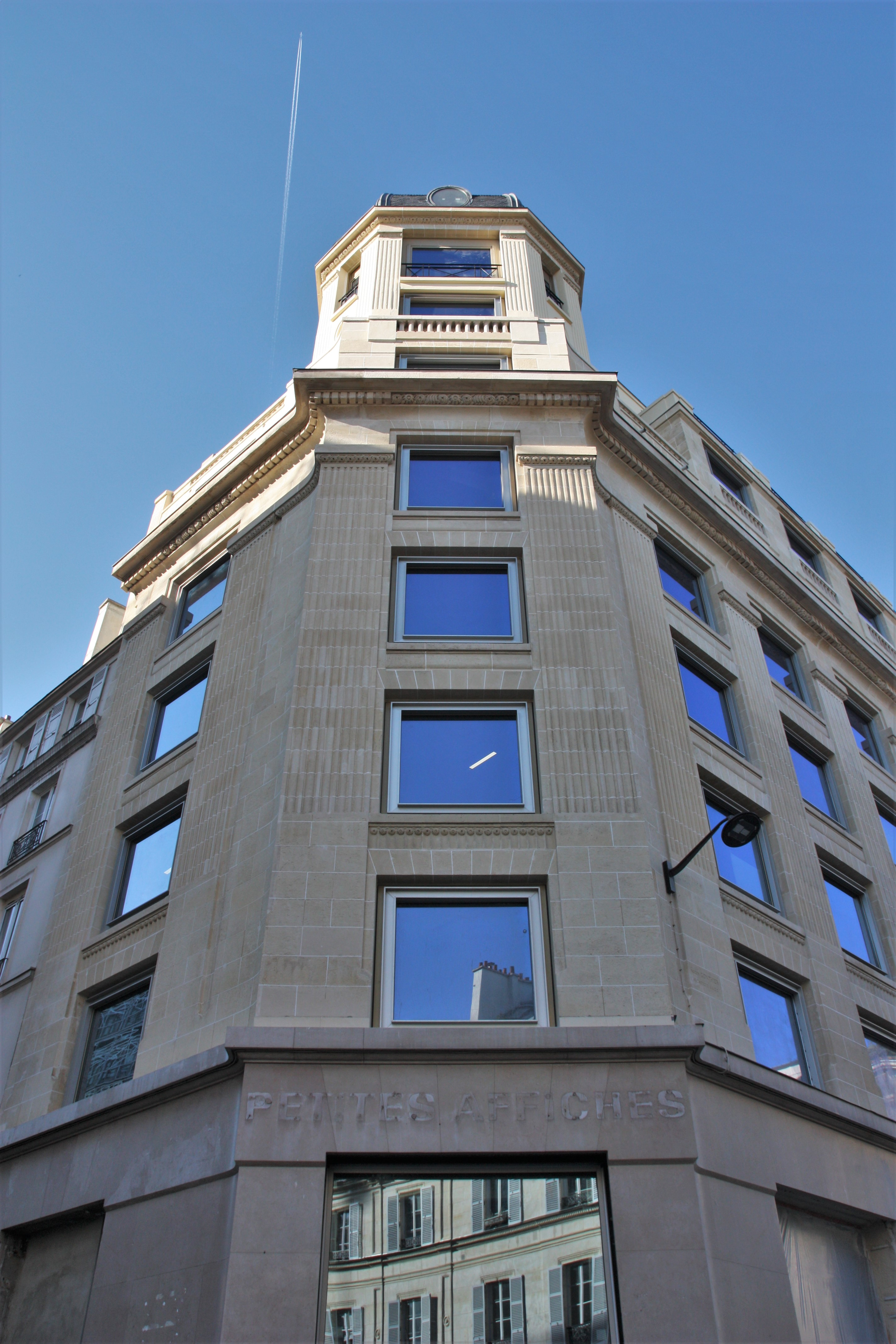 Paris 1er